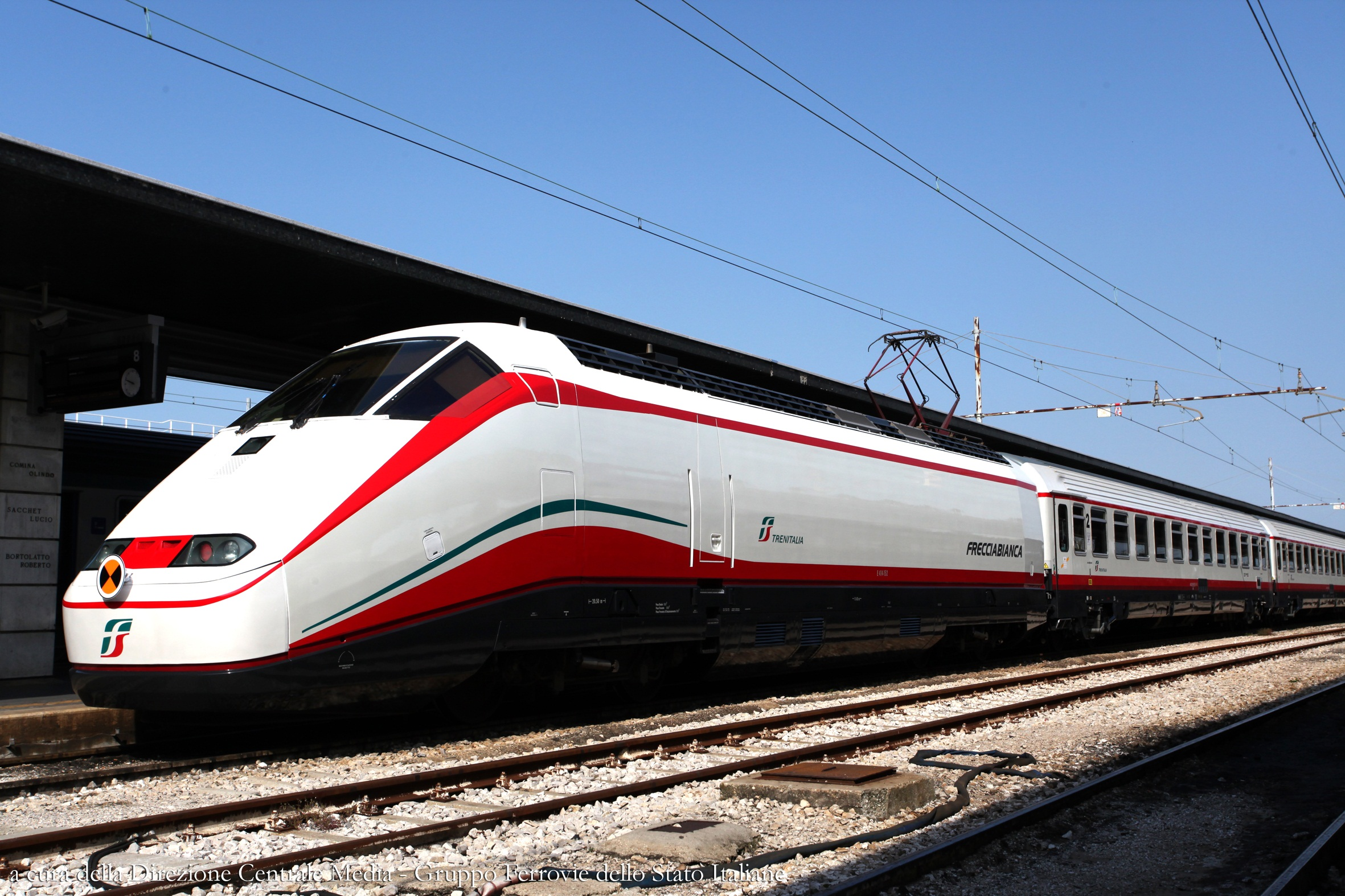 I Frecciabianca circolano su linee tradizionali al di fuori della rete Alta Velocità.